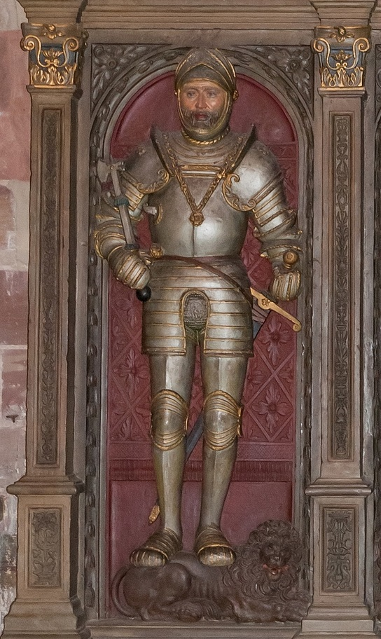 Grafmonument voor Johan Lodewijk van Nassau-Saarbrücken in de Stiftskirche Sankt Arnual